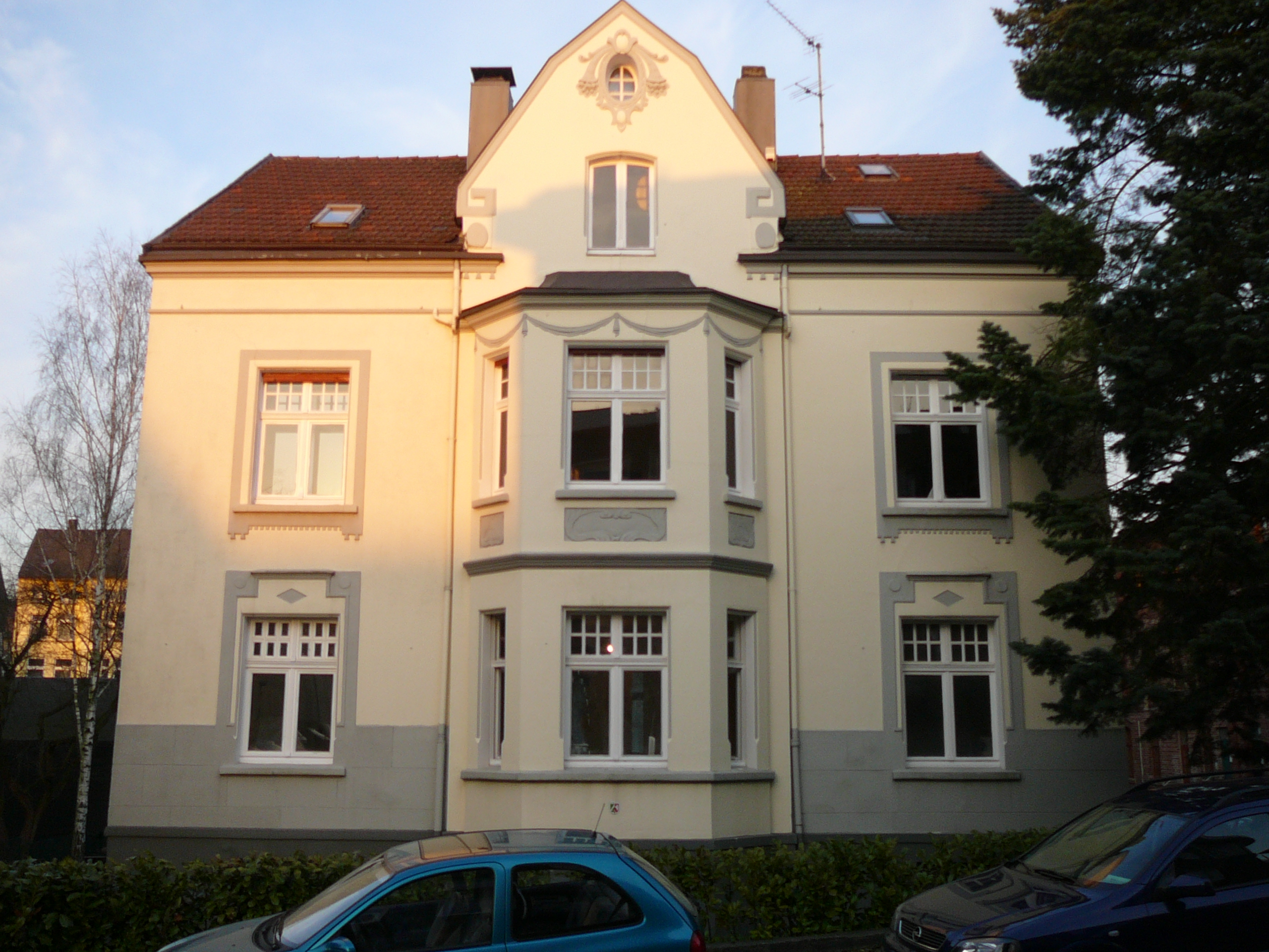 Villa Beckmannshagen, Beyeröhde, Wuppertal